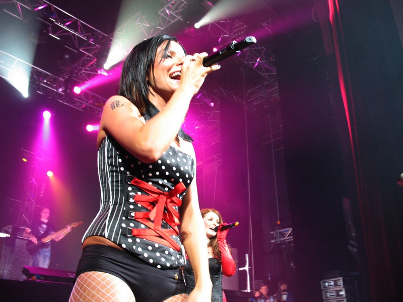 t.A.T.u. Bacardi B-LIVE in Moscow (Julia Volkova)